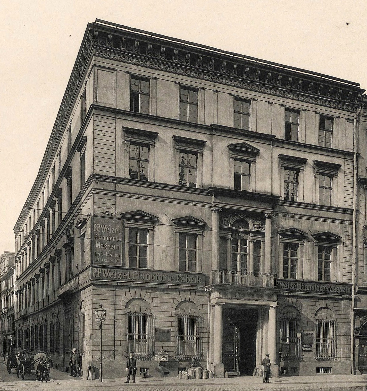 Winiarnia Philippich, kamienica przy ul. Wita Stwosza 16 we Wrocławiu. Lata 1895-1906